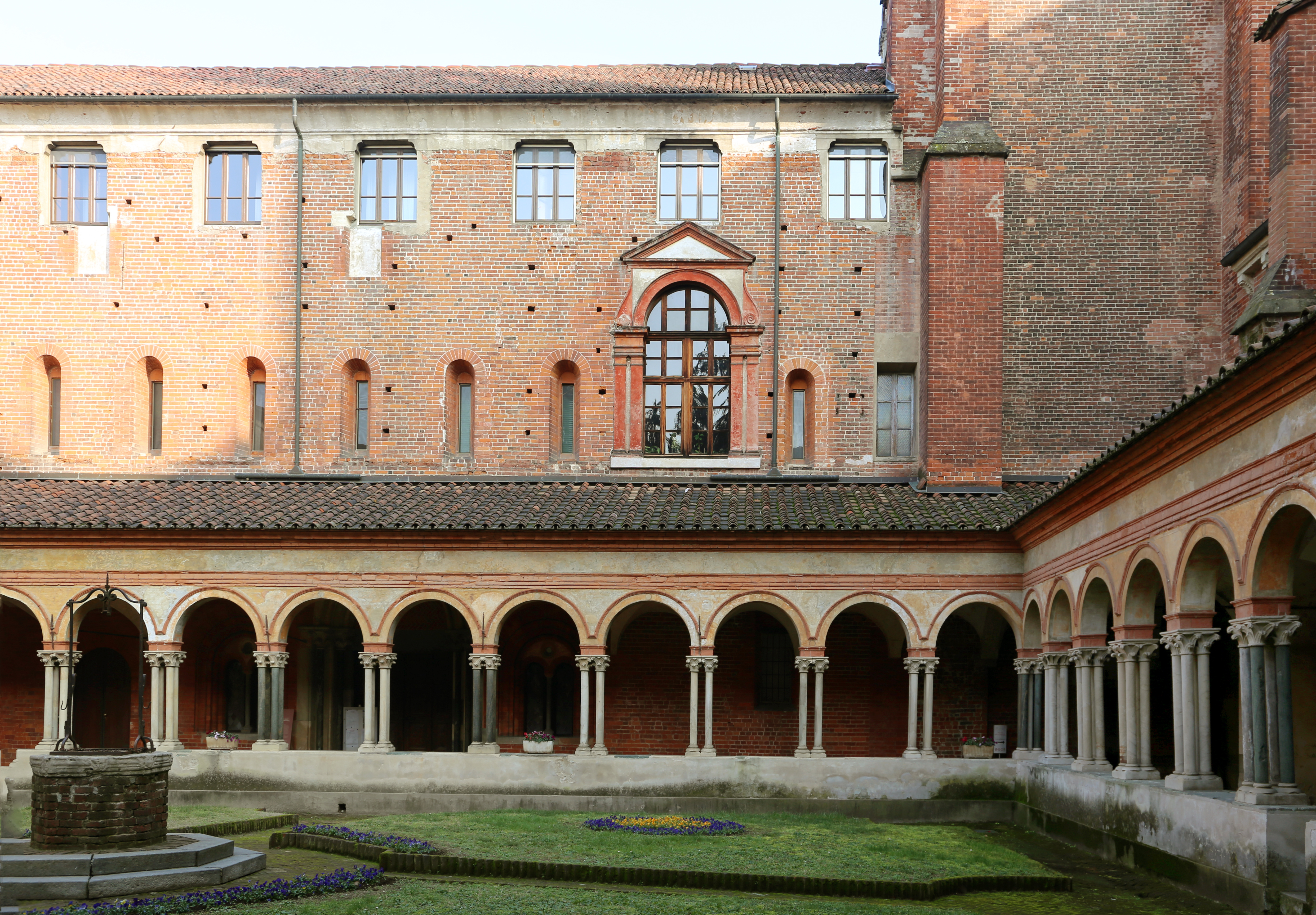 chiostro di Sant'Andrea This is a photo of a monument which is part of cultural heritage of Italy.